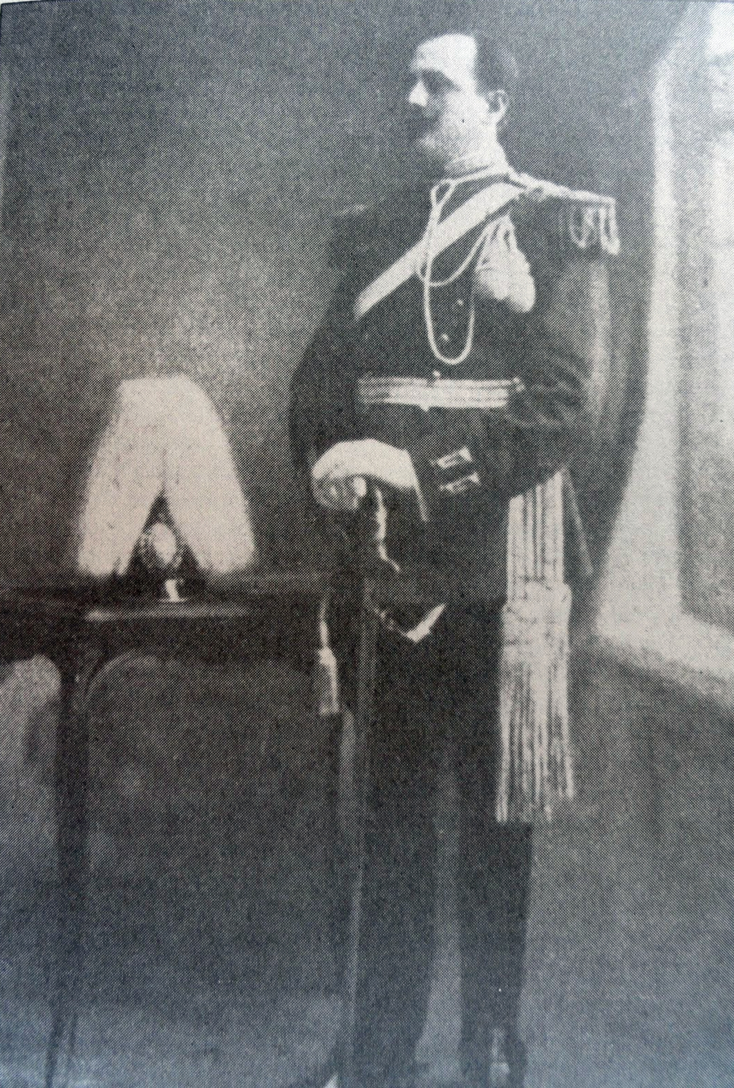 Foto del Comandante Carlos Domingo Fernández